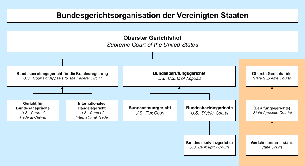 Diagramm der Gerichtsorganisation in den Vereinigten Staaten, selbst erstellt